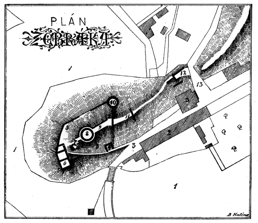 Žebrák – půdorys hradu od Baltazara Kutiny publikovaný roku 1889; Popis: 1 – rybníky, 2 – pivovar, 3 – bývalý hejtmanský dům, 4 – věž nad branou, 5 – hradba předhradí, 6 – nový palác, 7 – věž, 8 – velká věž, 9 – starý palác, 10 – dolní věž, 11 – hradba, 12 – budovy a hradby nad příkopem, 13 – příkop